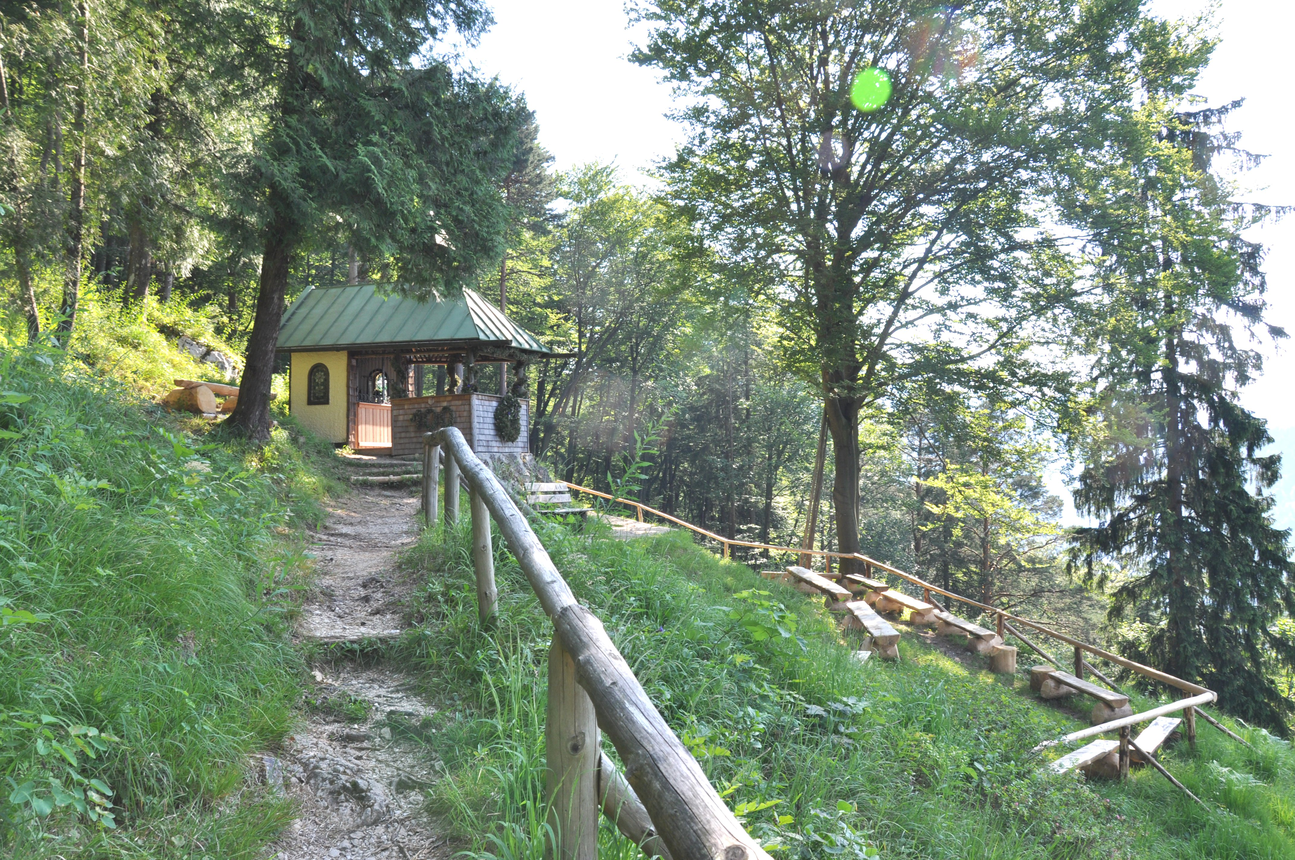 Bildstöckl-Kapelle in Bad Reichenhall am Predigtstuhl Bei Verwendung bitte ich hier um einen Hinweis, wo das Foto genutzt wird.